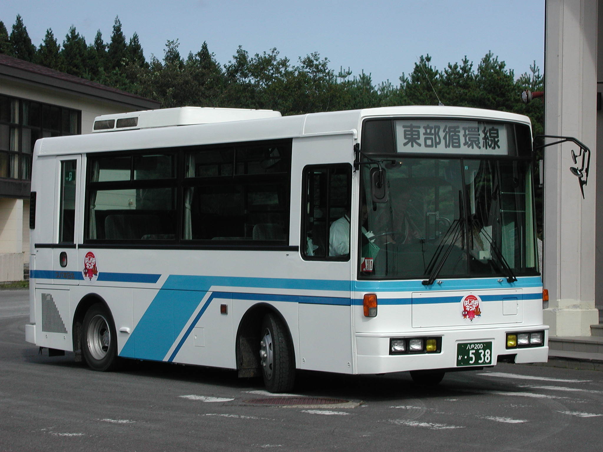 北日本中央観光バス（青森県三戸郡階上町）：「階上町コミュニティバス」「東部循環線」（日産ディーゼル・RN型：KC-RN210CSN） - 中古導入 ハートフルプラザ階上にて。